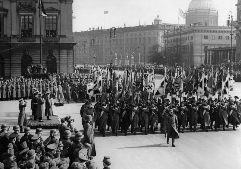 Berlin, Vorbeimarsch Ehrenkompanie Scherl Bilderdienst Heldengedenktag 1941 Der Führer nimmt nach der Kranzniederlegung im Ehrenmal den Vorbeimarsch des Ehrenbataillons der Wehrmacht ab. An der Spitze die Fahnenkompanie. Fcr. Hoffmann, 16.3.41 2802-41